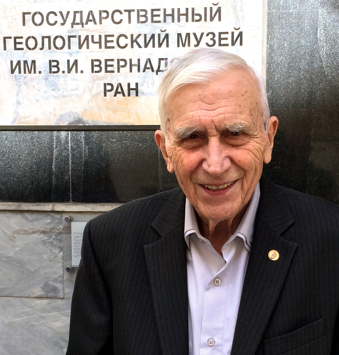 Георгий Борисович Наумов (1929—2019) — советский и российский геолог и геохимик, доктор геолого-минералогических наук, профессор, академик РАЕН и Академии Горных Наук, Заслуженный деятель науки Российской Федерации, Почётный разведчик недр, лауреат премии имени А. П. Виноградова РАН (2005). Исследователь истории геохимии и творчества академика В. И. Вернадского.